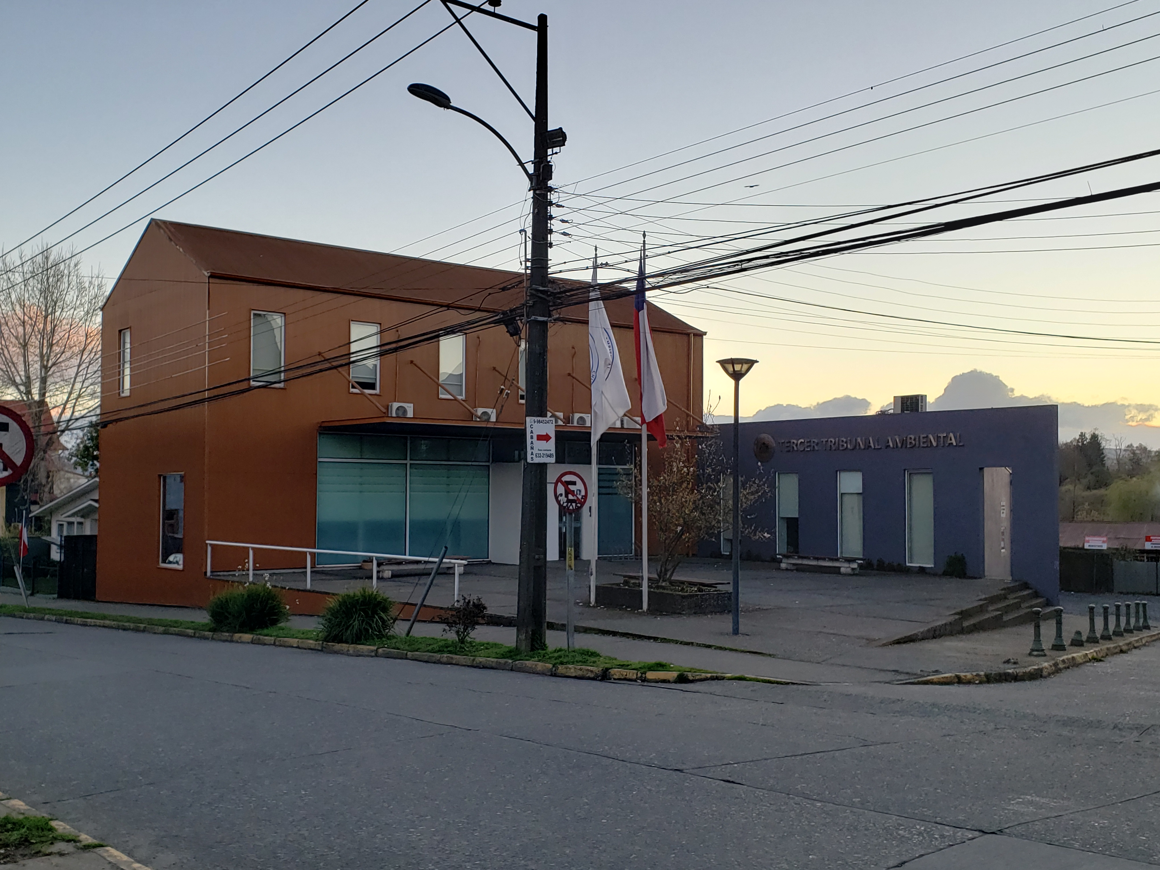 Edificio del Tercer Tribunal Ambiental de Valdivia